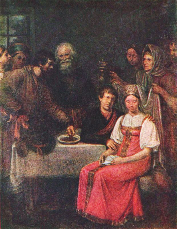 Михаил Теребенёв Крестьнская свадьба. 1815 г.